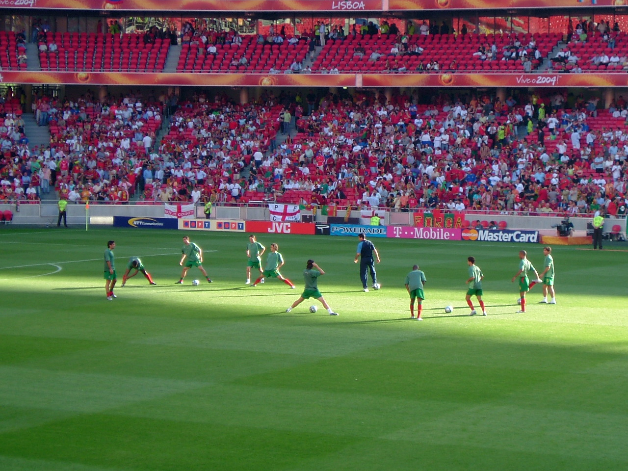 Equipa portuguesa no jogo Portugal - Rússia do Euro 2004 em trabalhos de aquecimento. Da esquerda para a direita: Figo, Jorge Andrade, Pauleta, Maniche, Ricardo Carvalho, Nuno Valente, Ricardo, Miguel, Simão Sabrosa, Costinha e Deco